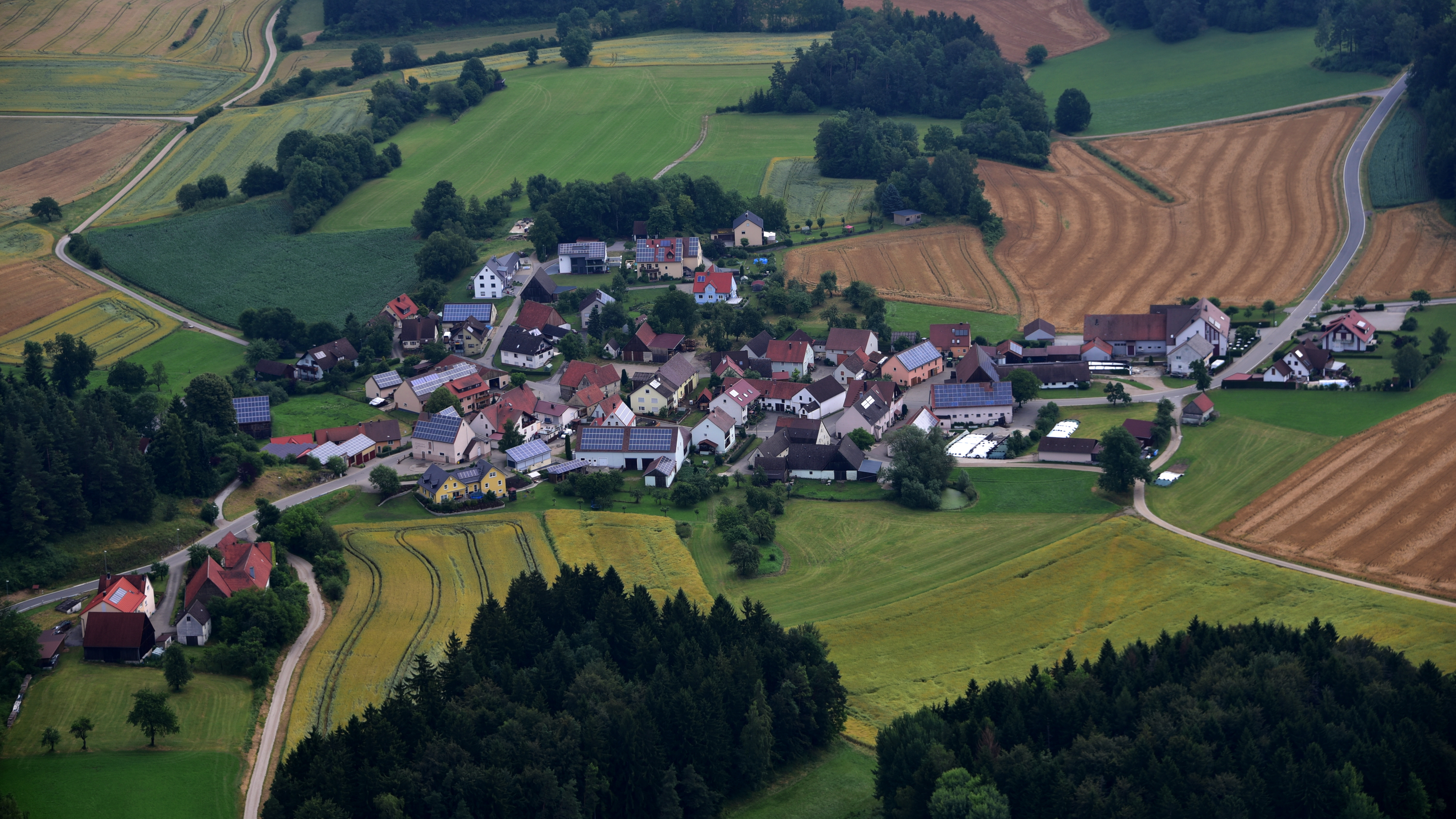 Lieritzhofen, Luftaufnahme (2016)